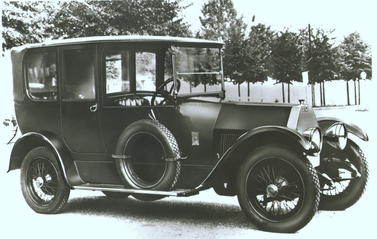 Vettura a quattro posti e due porte Lancia Theta 35 HP, 1913-1919 (Archivio e centro storico Fiat, Fondo Lancia)